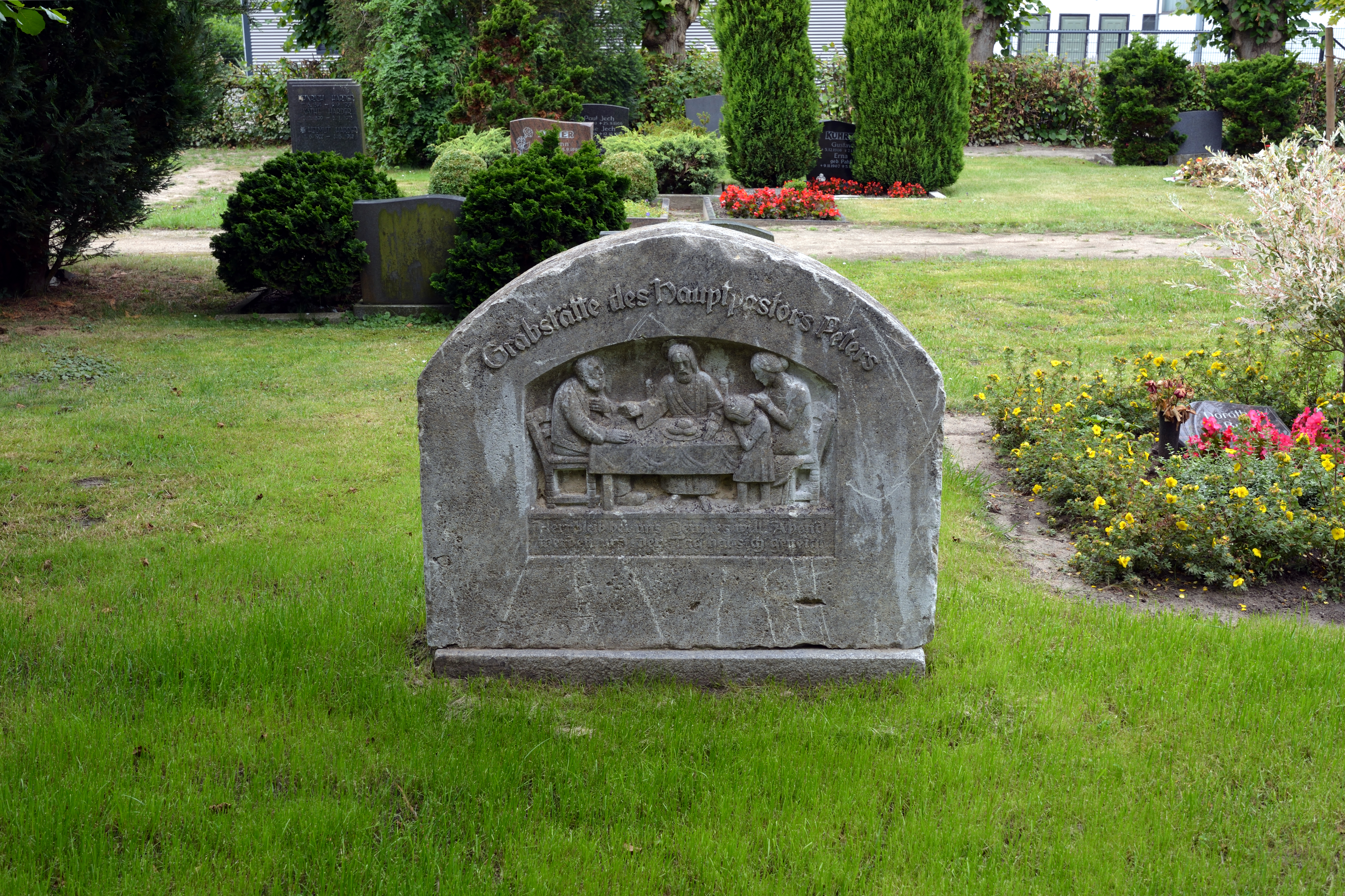 Bilder vom Friedhof in Krempe: Grabstein des Kremper Hauptpastors Friedrich Nicolaus Peters (20. Februar 1867 – 14. Oktober 1942), Amtszeit: 1908-1933. Details (“Das zweite Pastorengrab”, Seite 28).